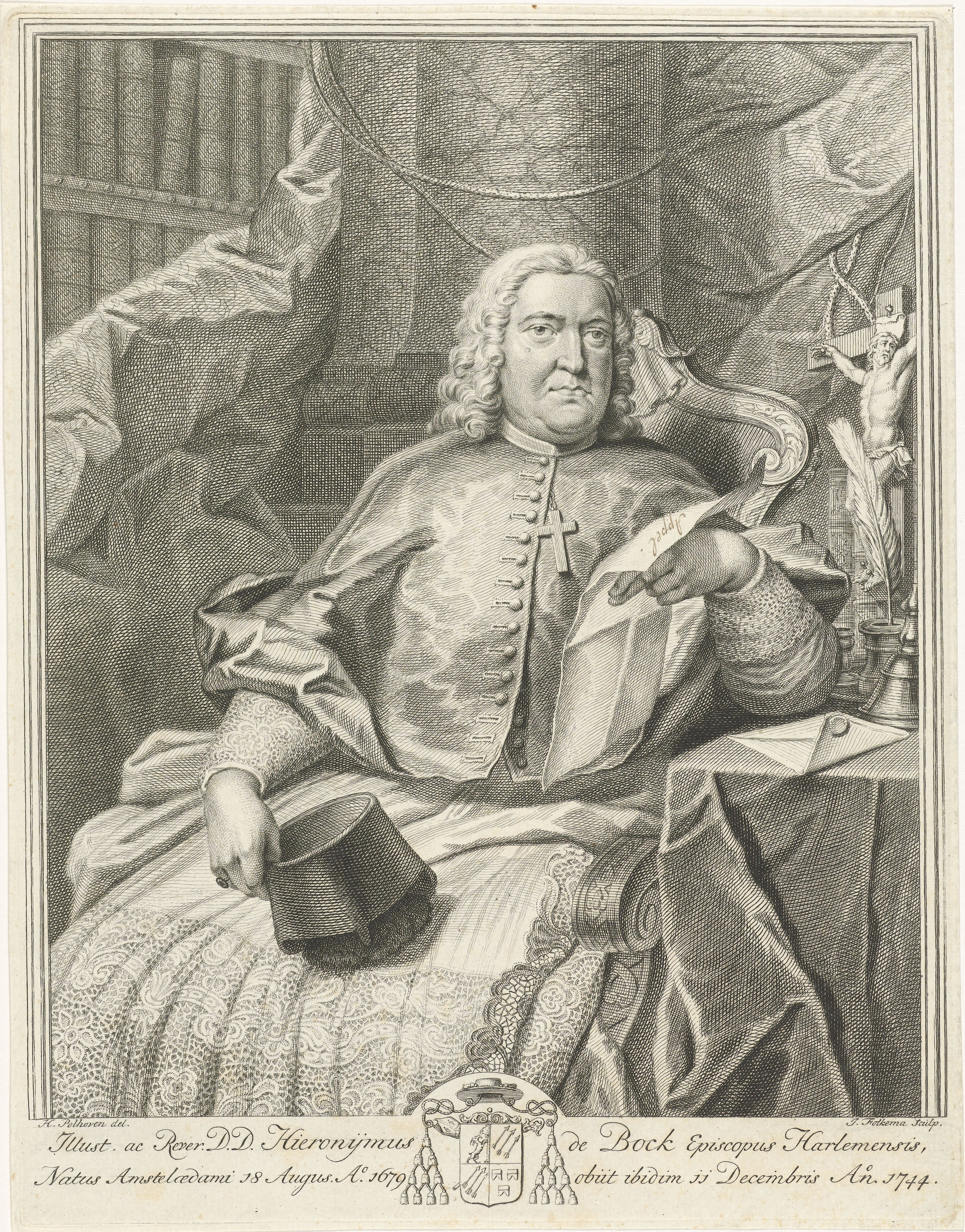 IdentificatieTitel(s): Portret van Hieronymus de BockObjecttype: prent Objectnummer: RP-P-OB-52.182Catalogusreferentie: FMP 484-aOpschriften / Merken: verzamelaarsmerk, verso, gestempeld: Lugt 2228opschrift, recto, handschrift in bruine inkt: ‘Appèl’Omschrijving: Portret van pseudo-bisschop van Utrecht Hieronymus de Bock, blootshoofds. Kniestuk, zittend in een stoel naar rechts gedraaid. In zijn rechterhand houdt de geestelijke zijn biretta en in zijn linkerhand een brief Waar: op handgeschreven met bruine inkt staat: Appèl. Onder het portret staan in het Latijn zijn naam, titel, geboorte- en sterfdatum en het wapen van de geportretteerde.VervaardigingVervaardiger: prentmaker: Jacob Folkema (vermeld op object)naar tekening van: Hendrik Pothoven (vermeld op object)Datering: 1735 - 1767Fysieke kenmerken: etsMateriaal: papier Techniek: etsenAfmetingen: plaatrand: h 260 mm × b 201 mmOnderwerpWie: Hieronymus de BockVerwerving en rechtenVerwerving: onbekendCopyright: Publiek domein